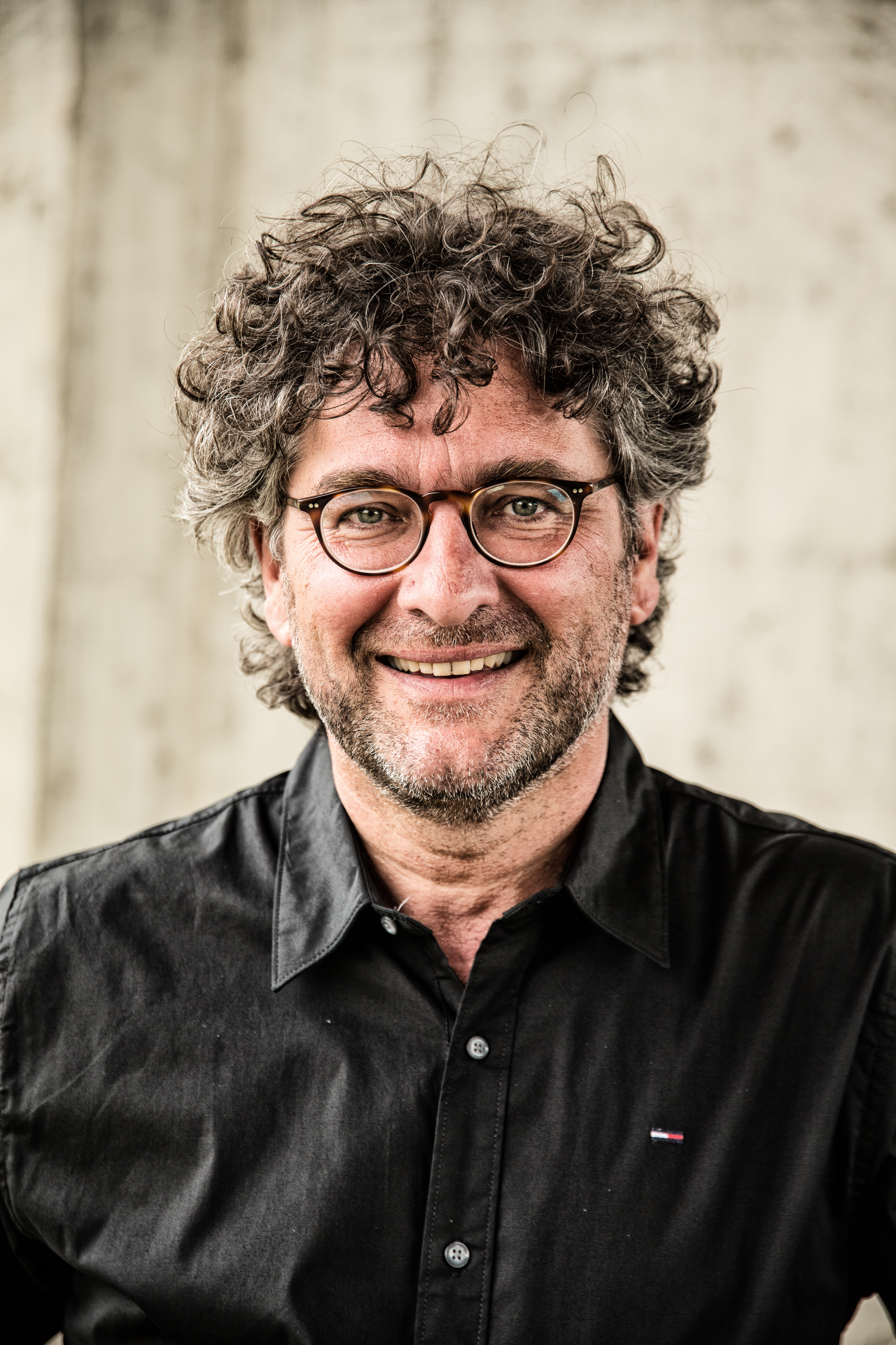 Porträt